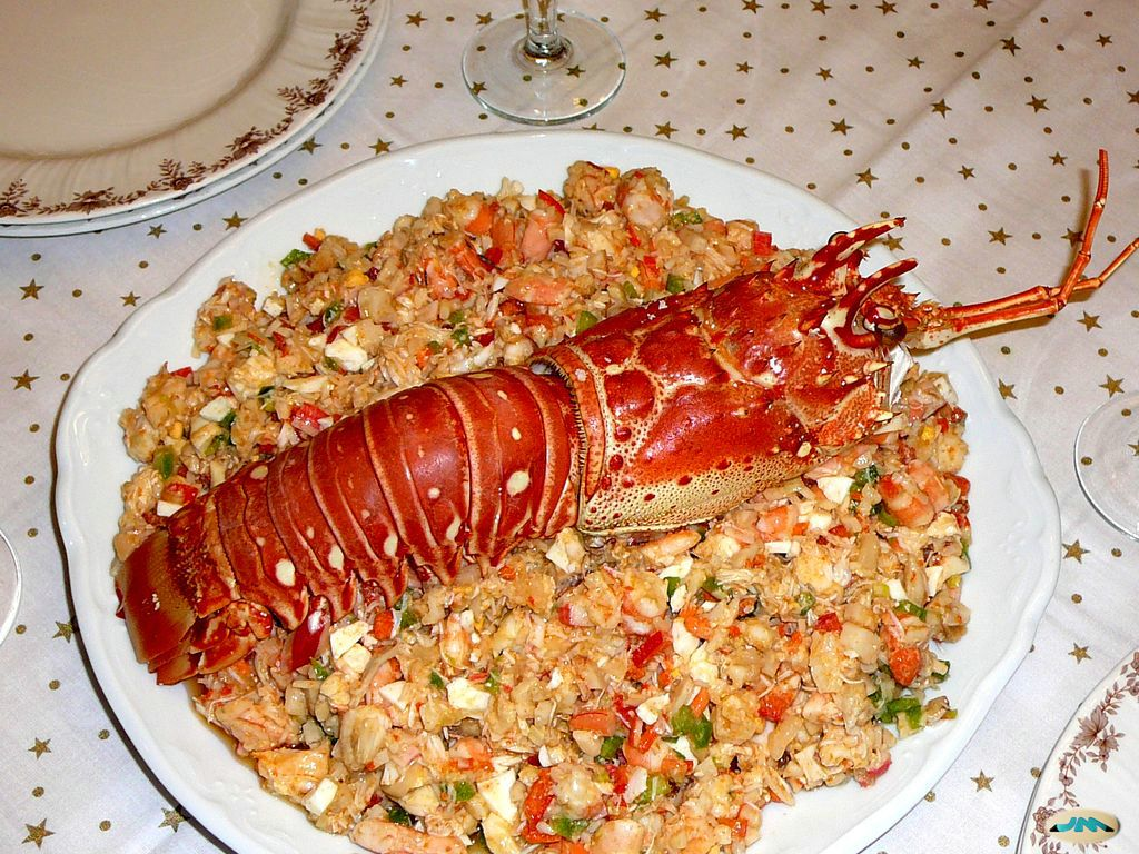 Salpicón de marisco, Galiza